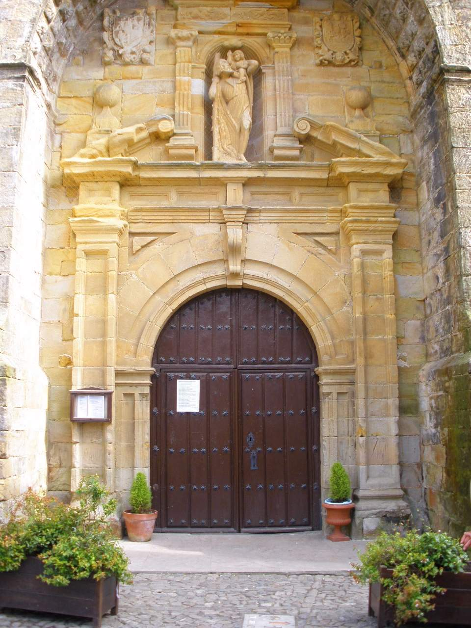 Iglesia de San Cristóbal (Comillas, Cantabria)